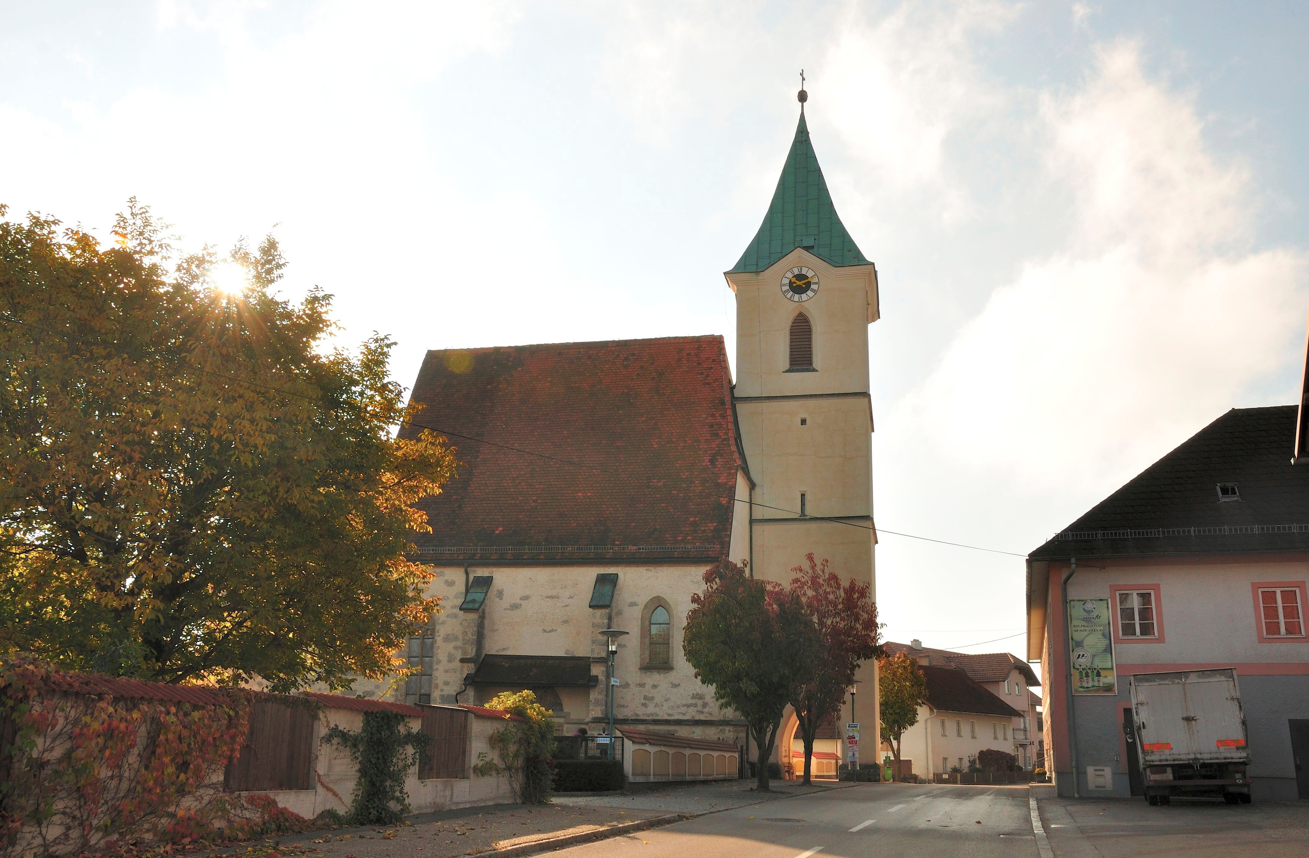 Kath. Pfarrkirche hl. Nikolaus und Friedhof